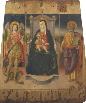 Cerveteri, chiesa di Santa Maria Maggiore: dipinto di madonna col Bambino in trono con santi, opera di Lorenzo da Viterbo.